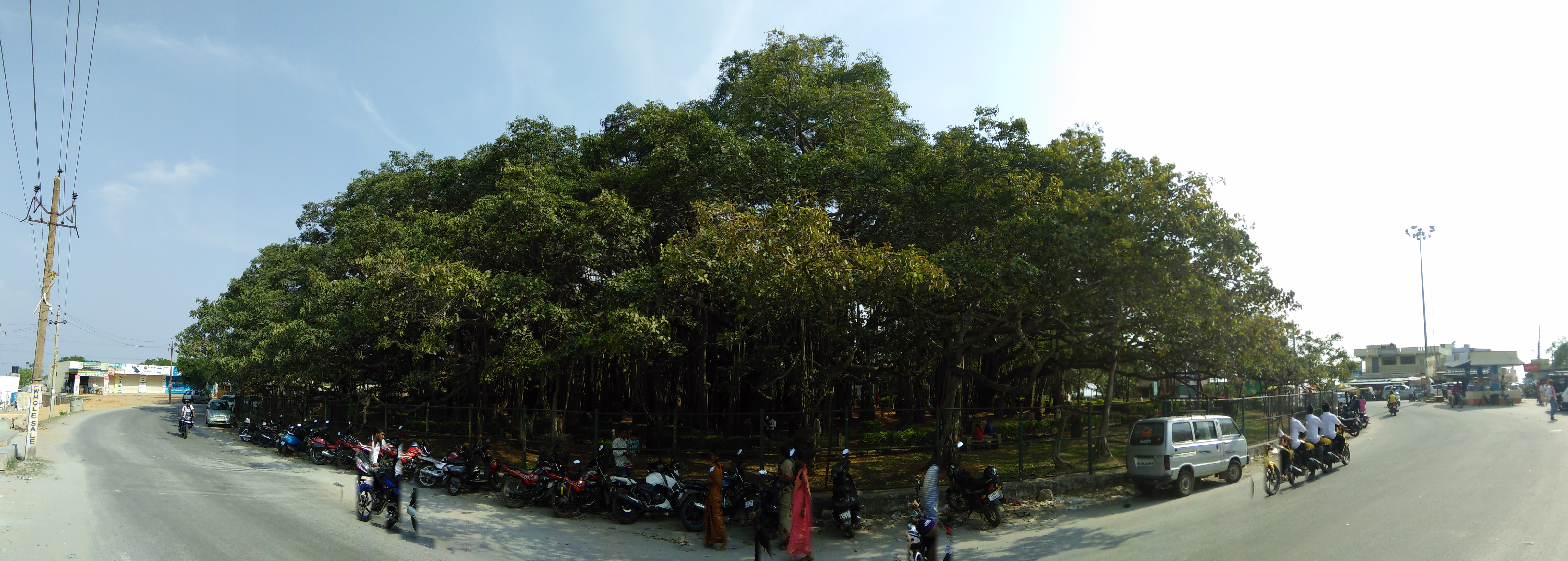 The great banyan tree at Dodda Alada Mara in Bangalore Urand District, Karnataka, India